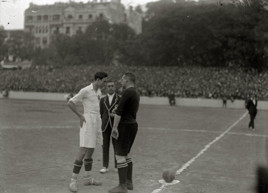 ESCENAS DE LA FINAL DE CAMPEONATO DE ESPAÑA EN EL CAMPO DE ATOTXA ENTRE LOS EQUIPOS DEL REAL UNION Y REAL MADRID (1-0). (Mojardin (R.Madrid) & René Petit (R.Unión).